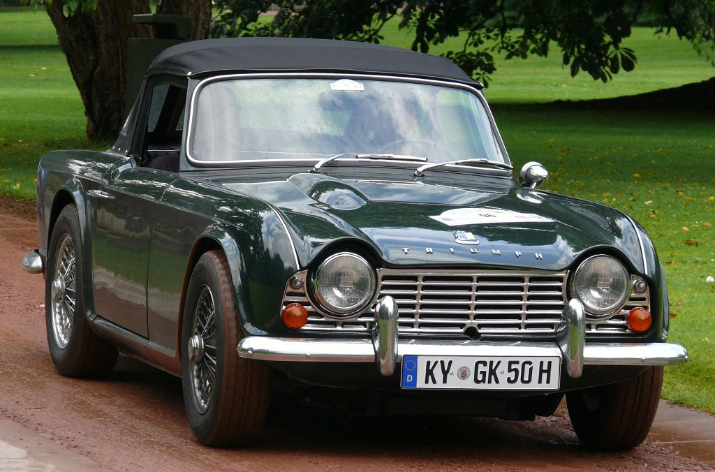 Triumph TR 4